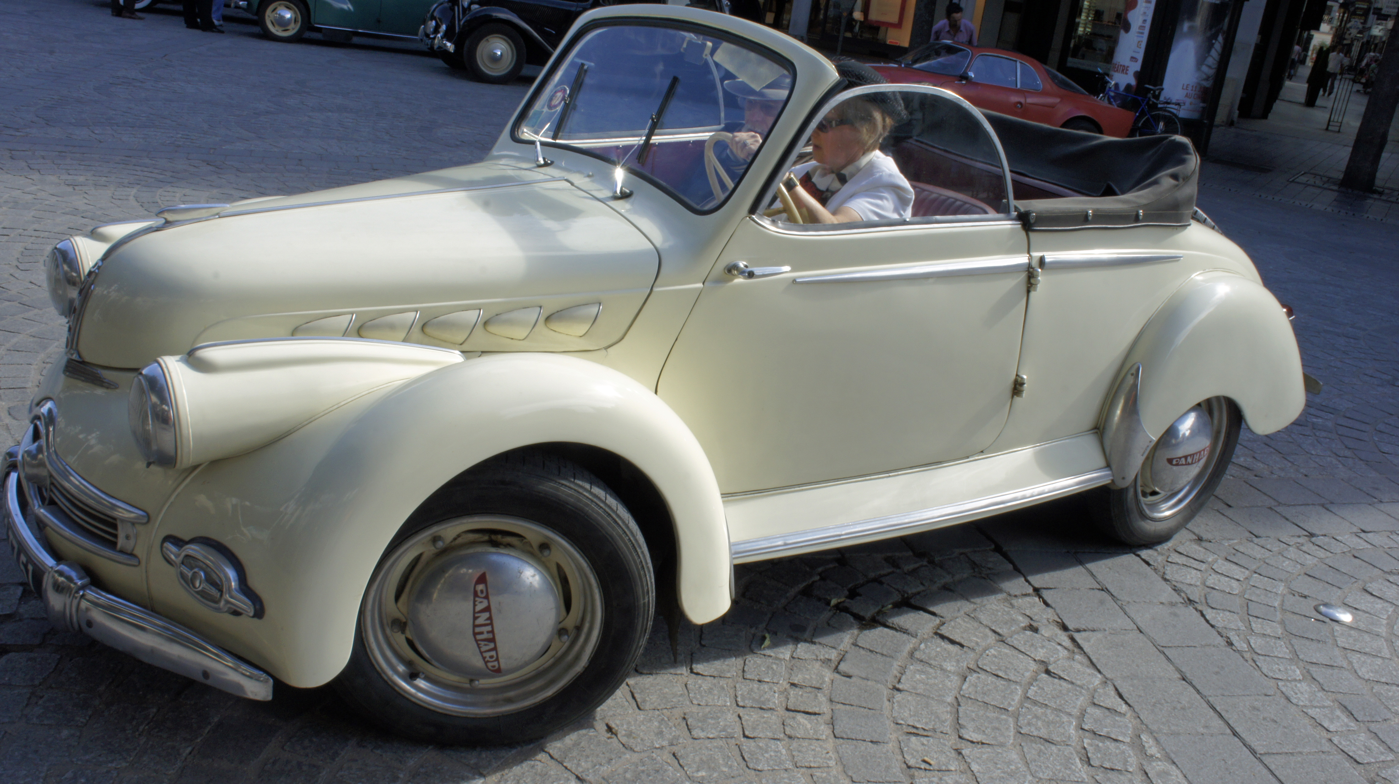 Décapotable Panhard Dyna X en 2012 place d'Erlon à Reims.